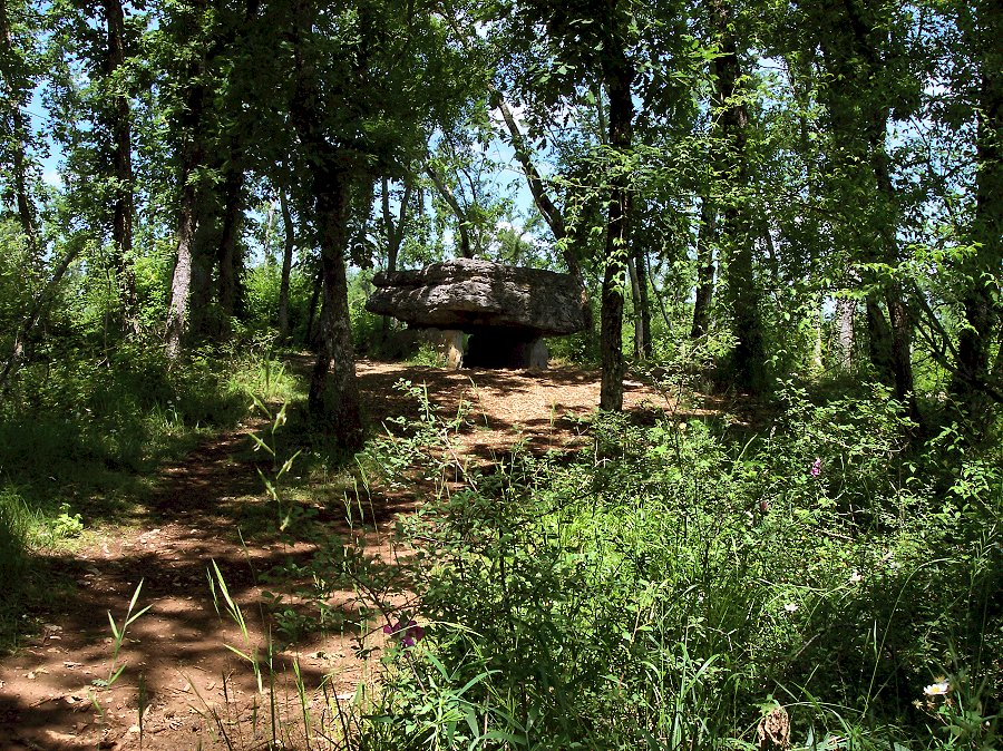 Dolmen d'Agranel ou du Lac d'Aurié